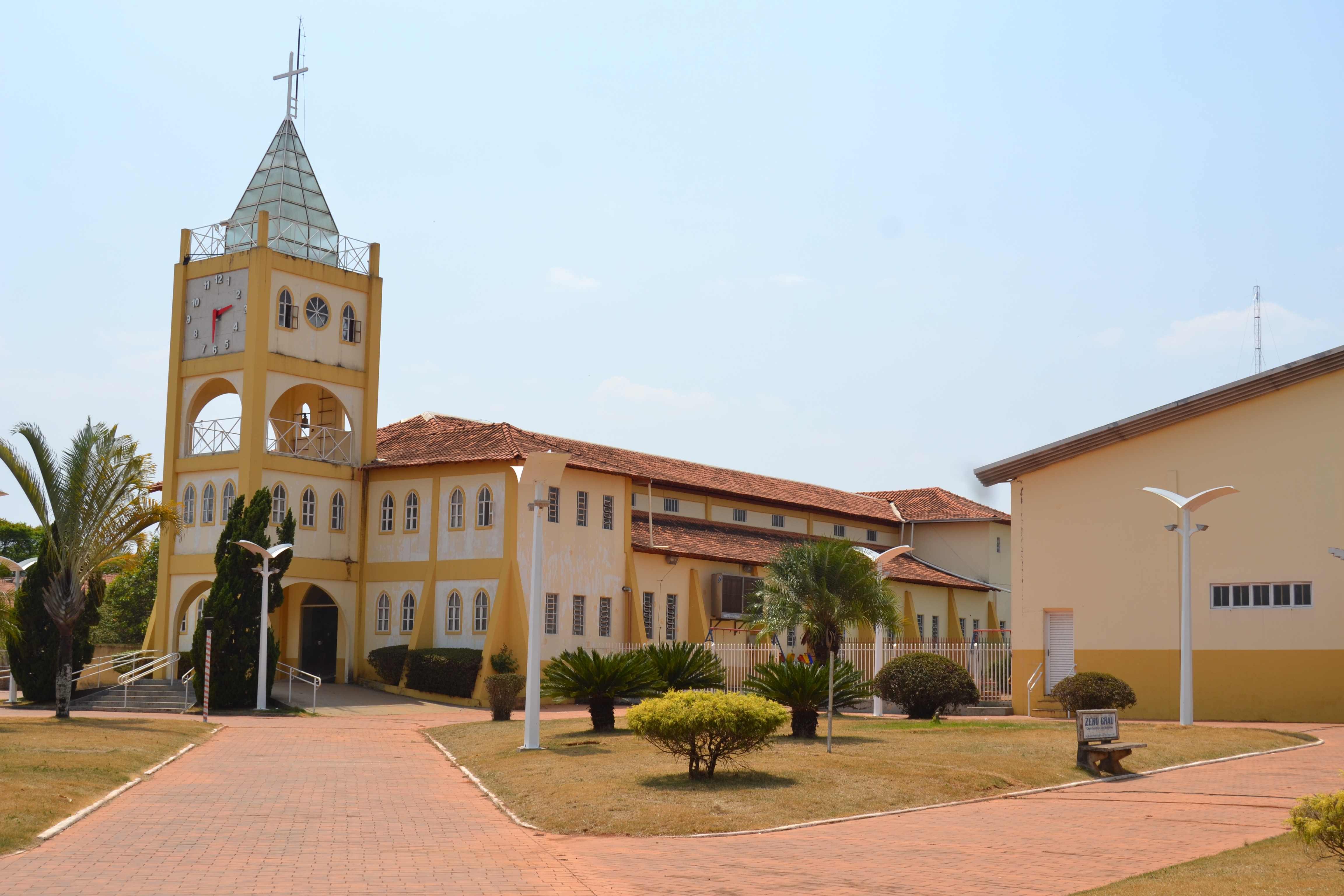 Foto: Geovane Timóteo